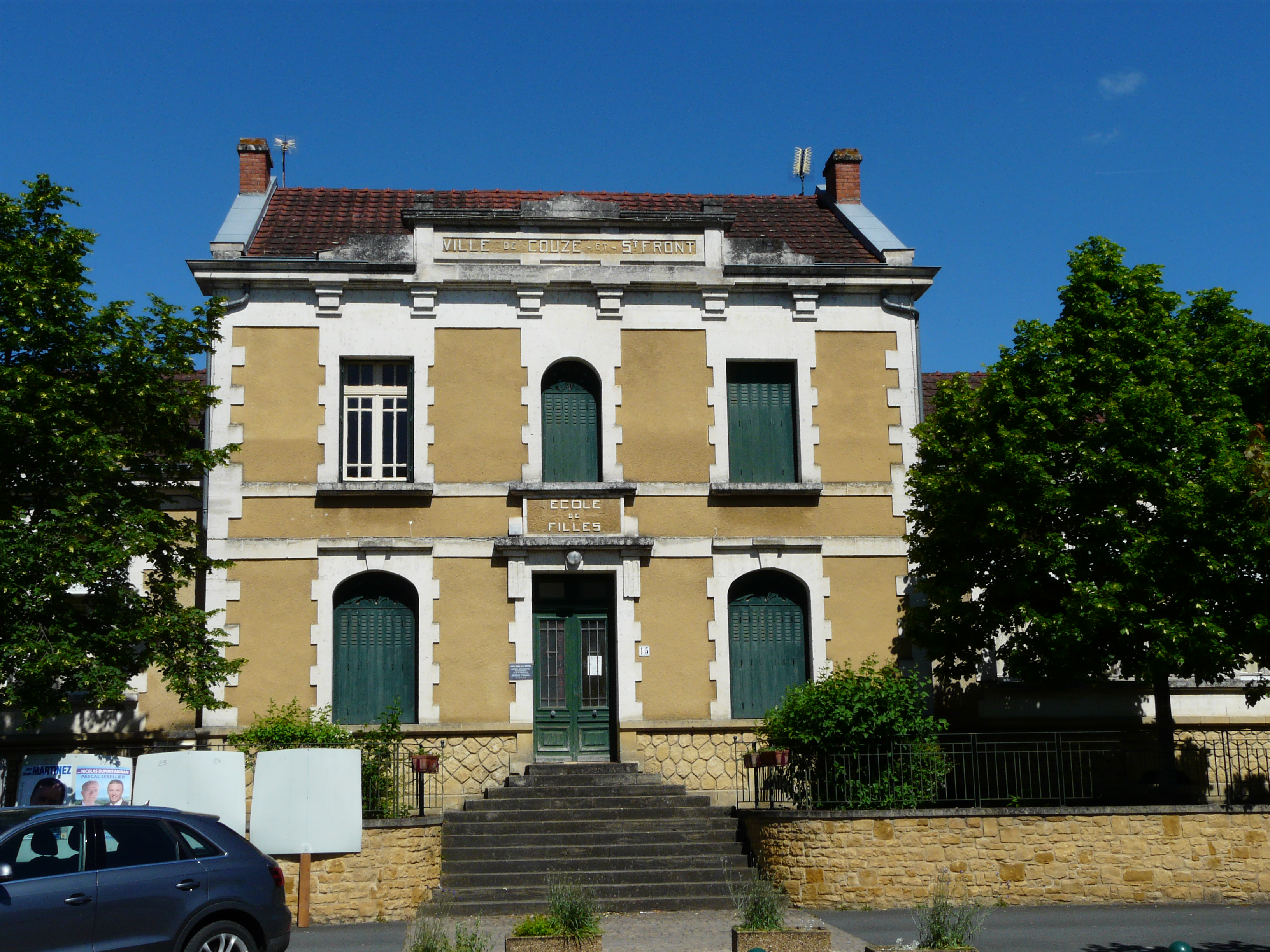 École dans le village de Couze-et-Saint-Front, Dordogne, France.